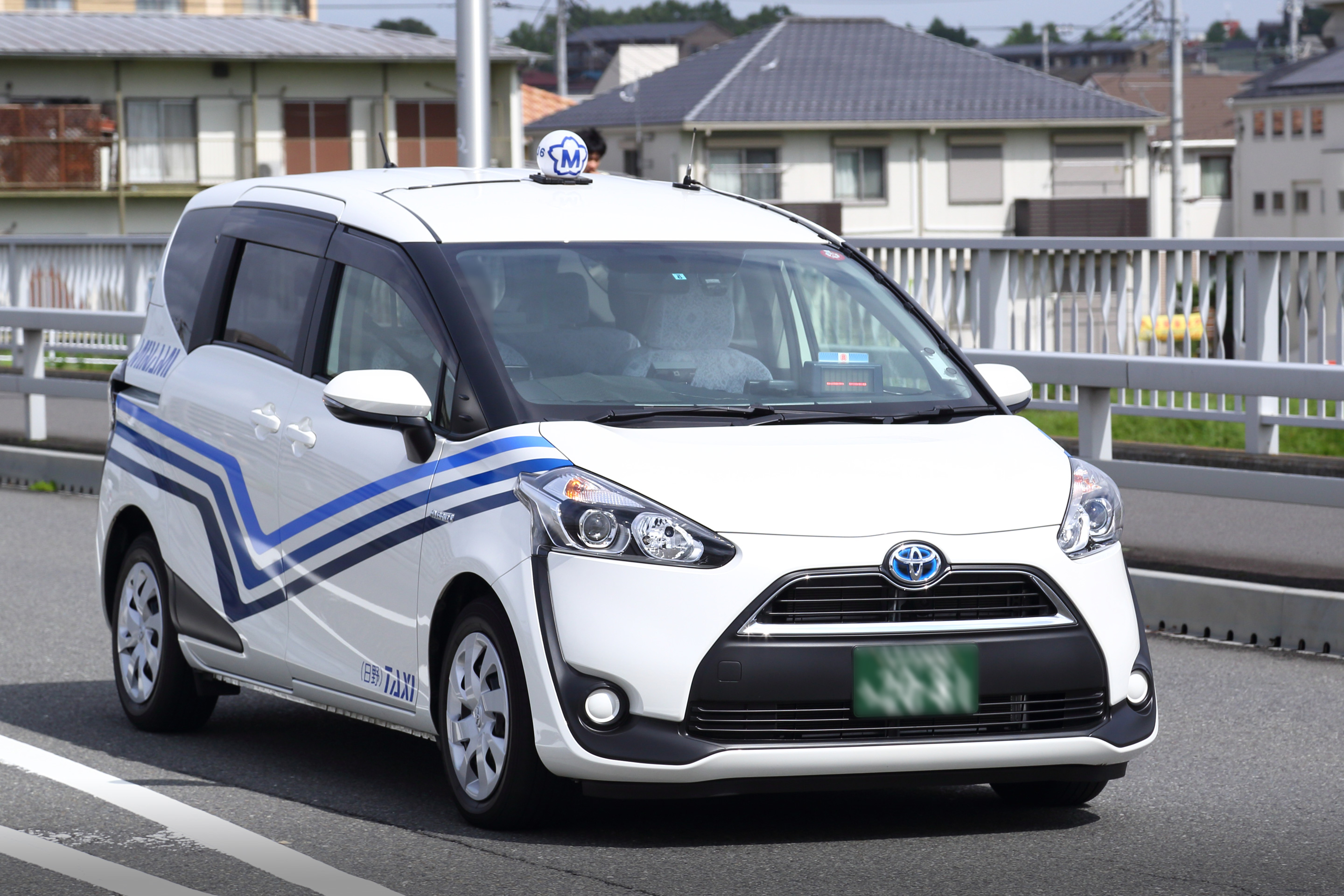 トヨタ・シエンタ（ハイブリッド車）によるja:南観光交通のタクシー。